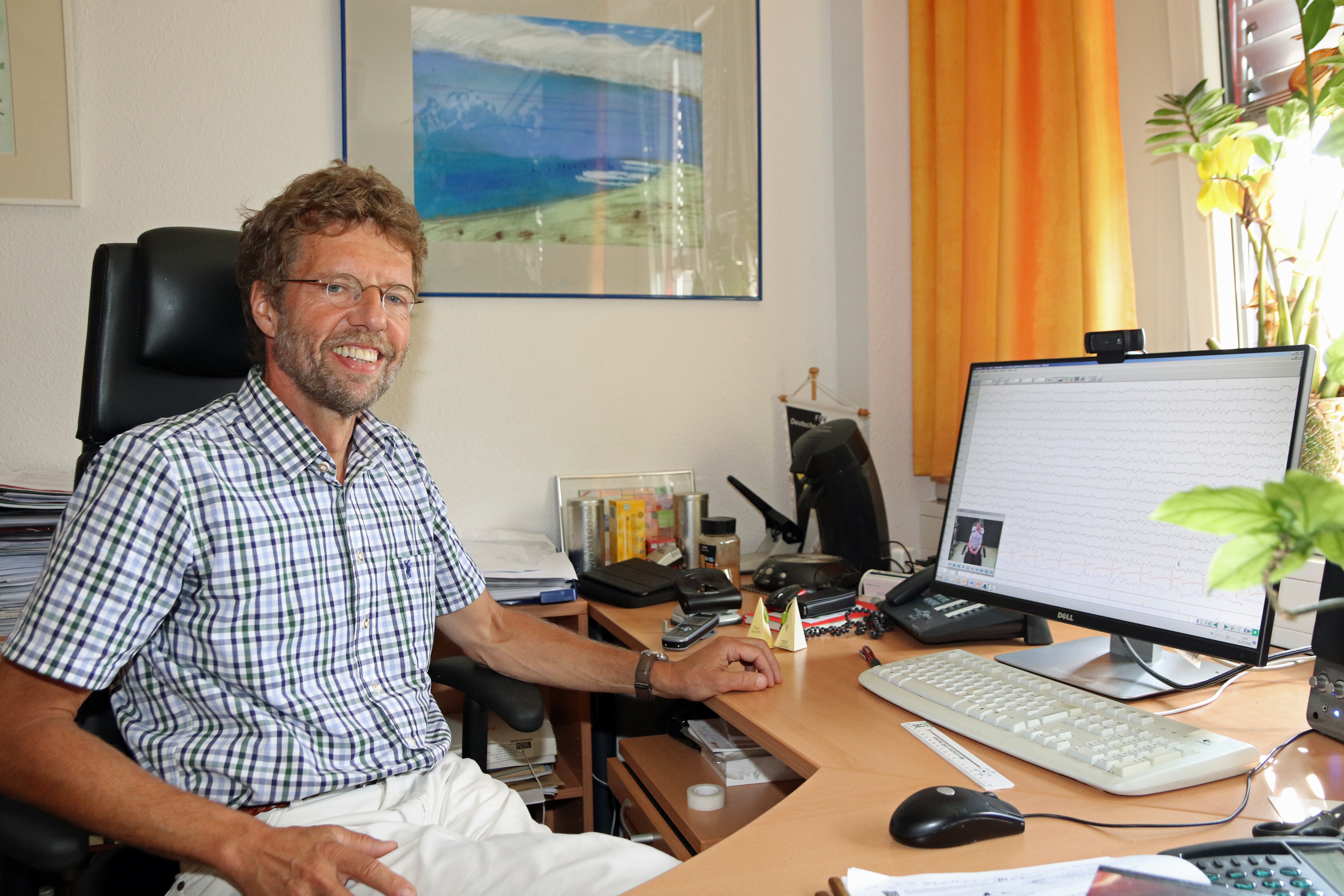 Dr. Thomas Mayer, Neurologe und Epileptologe, Chefarzt Sächsisches Epilepsiezentrum Radeberg